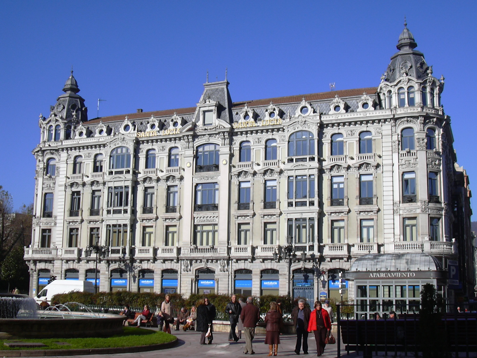 Edifício de Santa Lucía na cidade espanhola de Oviedo